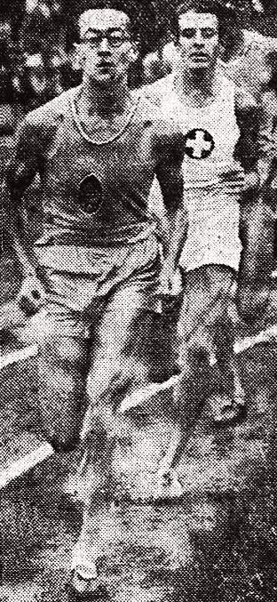 Jacques Lévèque, vainqueur du 800 mètres lors de France-Suisse 1938 à Bâle.